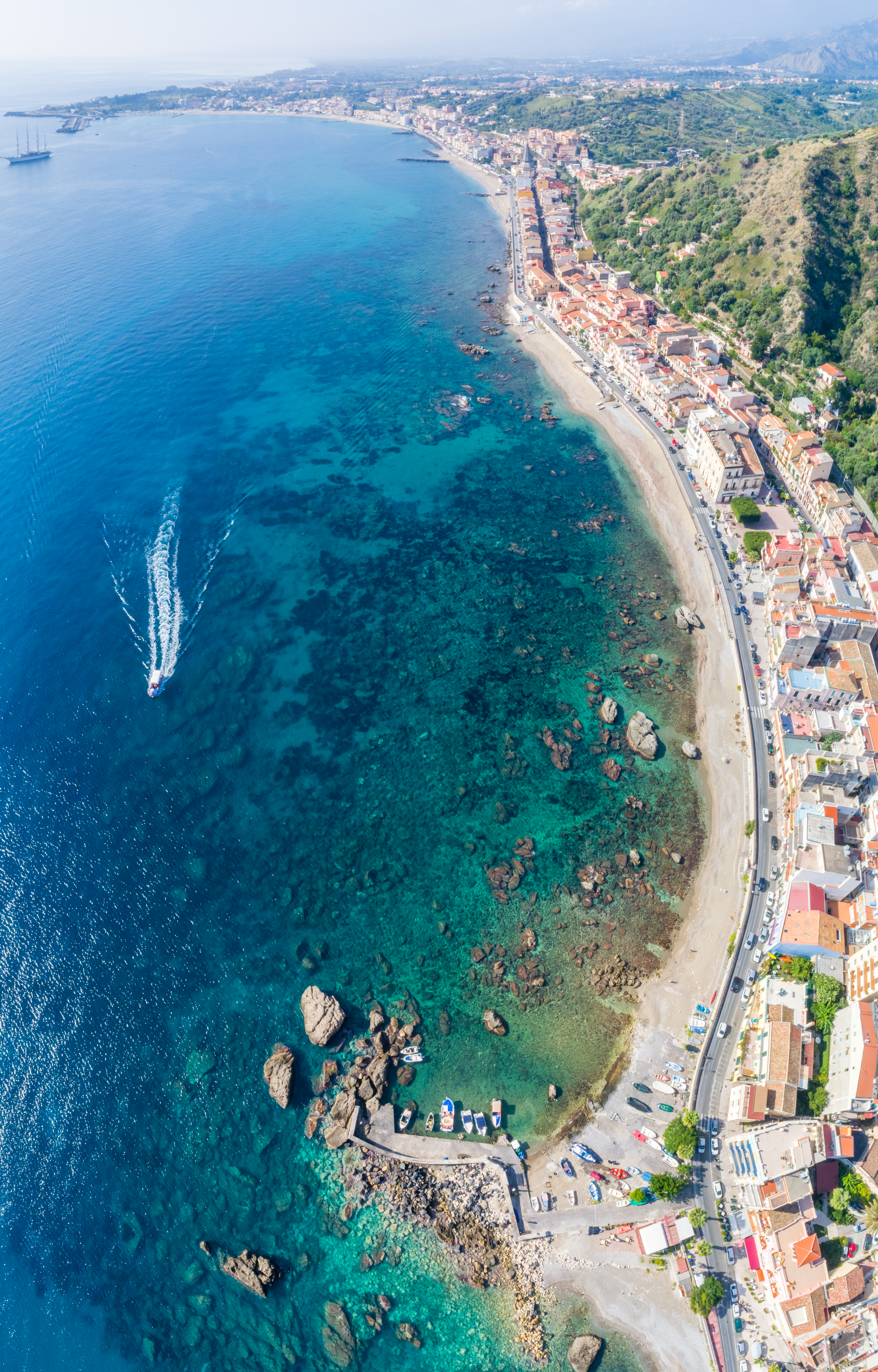 Giardini-Naxos vertical pano